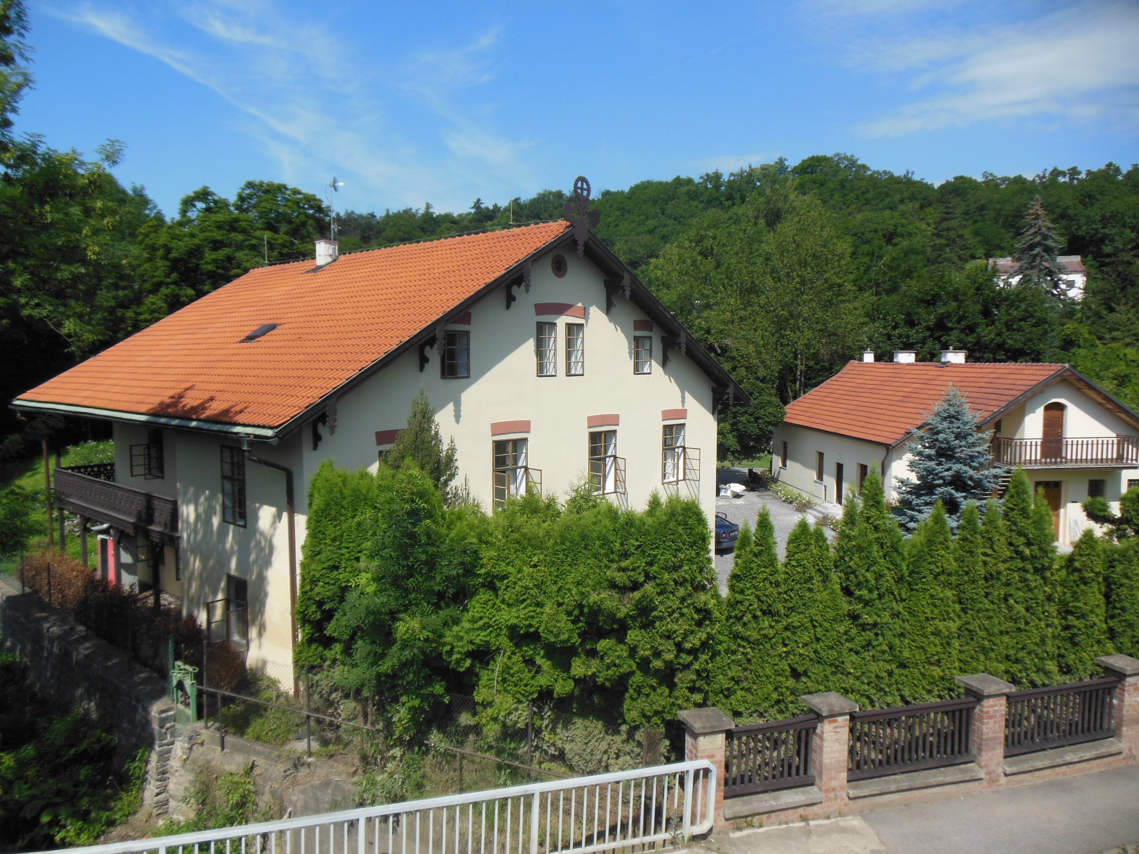 Braunerův mlýn v ulici Riegrova v Roztokách u Prahy.